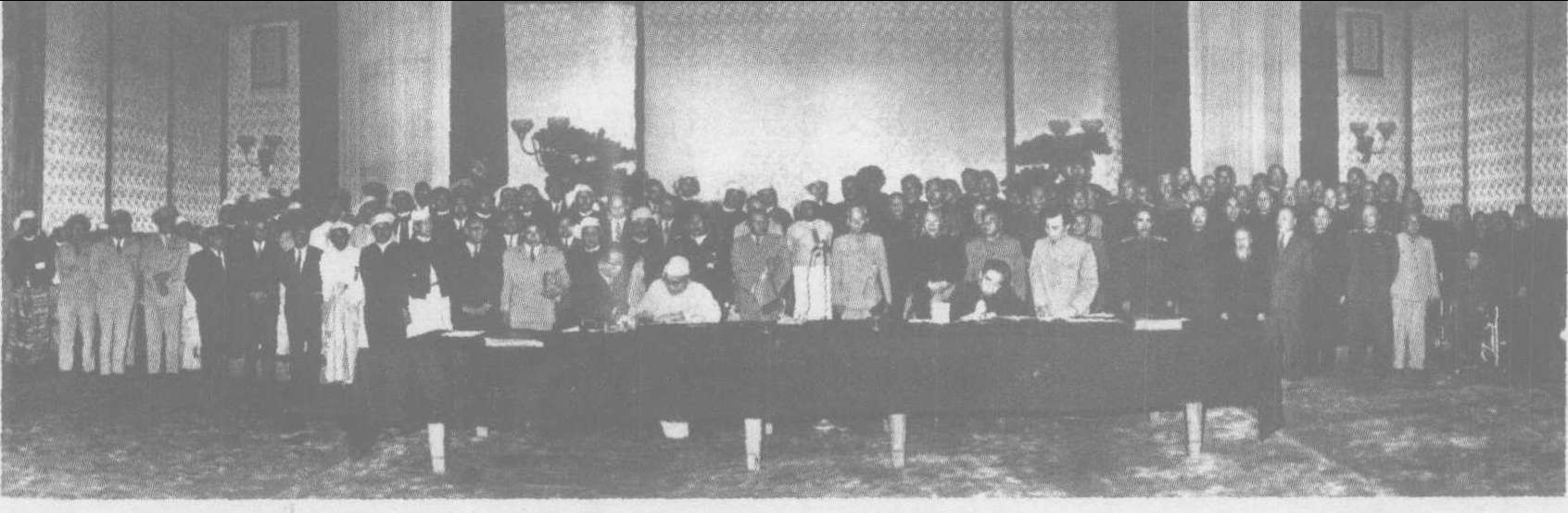 中文（中国大陆）: 1960年周恩来与吴努《中缅边界条约》签字仪式